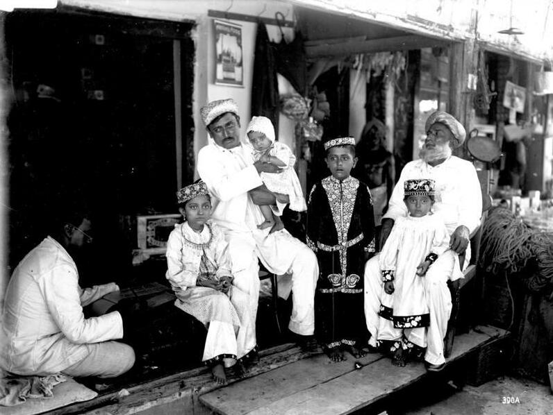 Bagamojo, Indische Kaufmannsfamilie